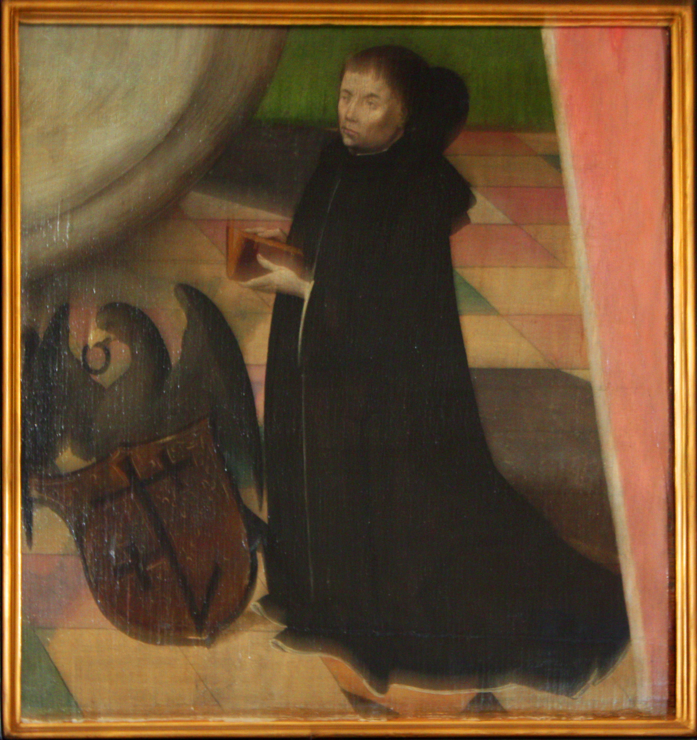 Peter Rinck war ein Gelehrter des 15. Jahrhunderts. Er war ein promovierter Jurist und Rektor an der mittelalterlichen Universität zu Köln